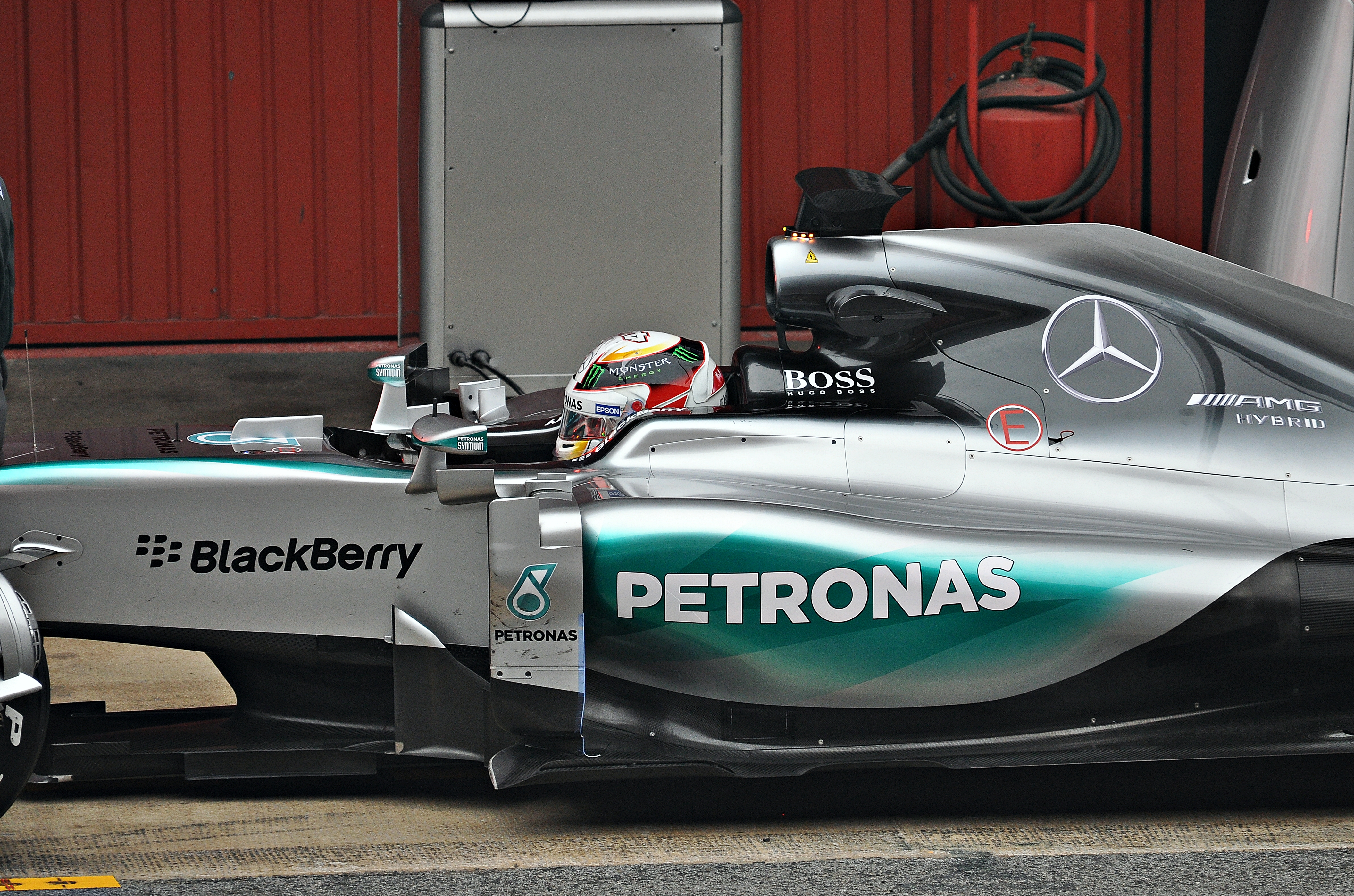 Test days Barcelona 2015